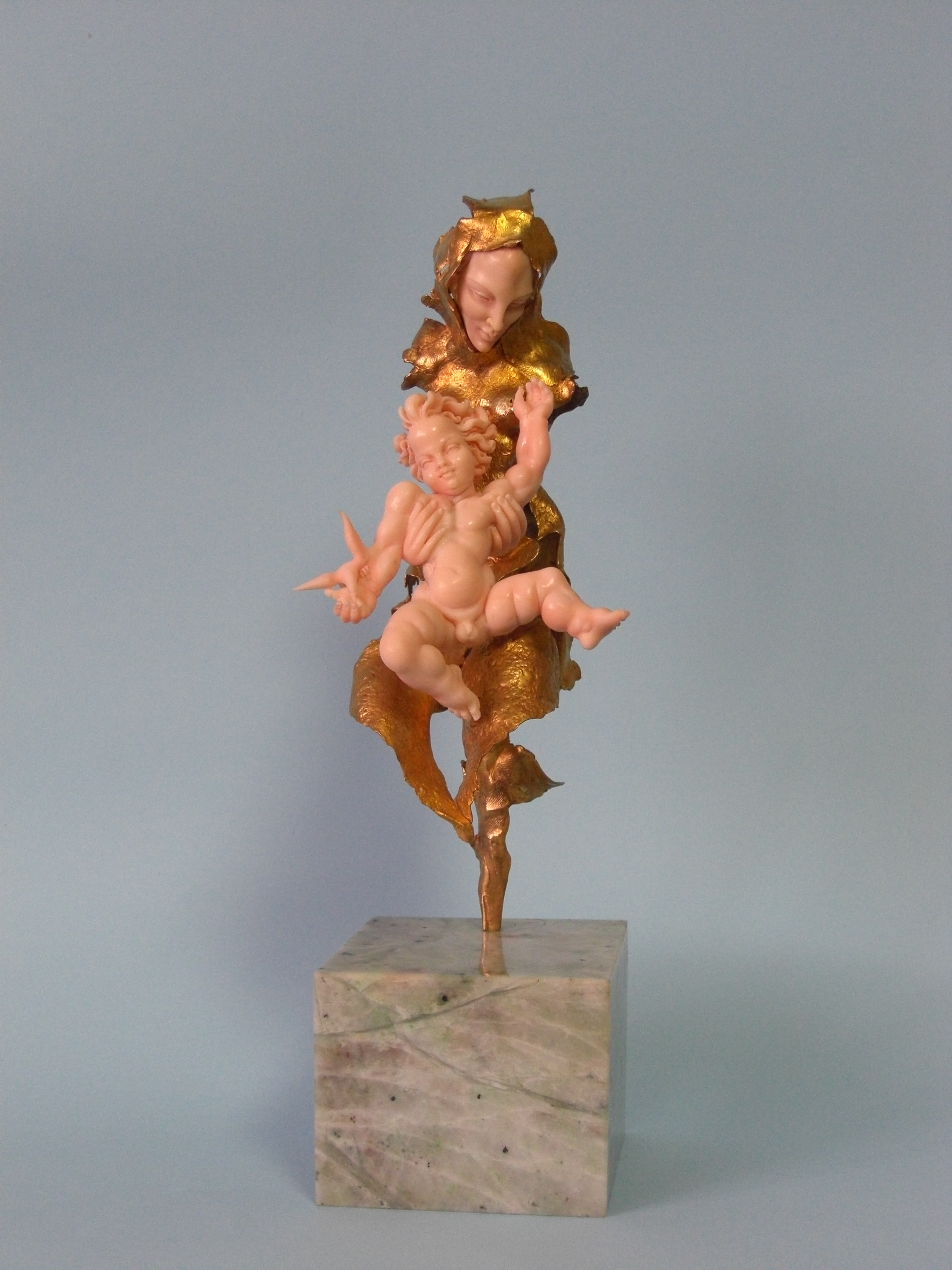 maternita' in corallo rosa boke' argento dorato marmo